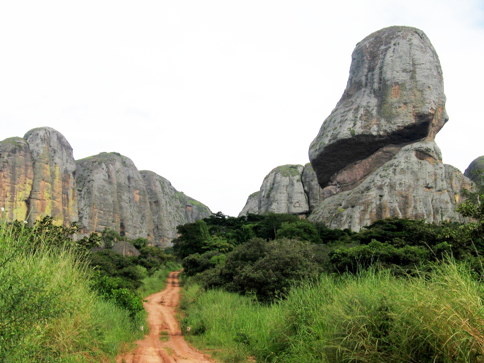 The "Black Stone" of Pungo Andongo, Malange, Angola